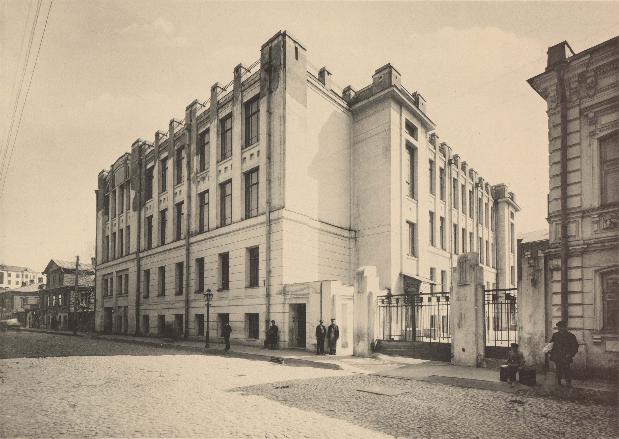 9. Училищное зданiе въ СтрЪлецкомъ пер. (Костянский пер. 6 - Москва. Cнесли в 2009)